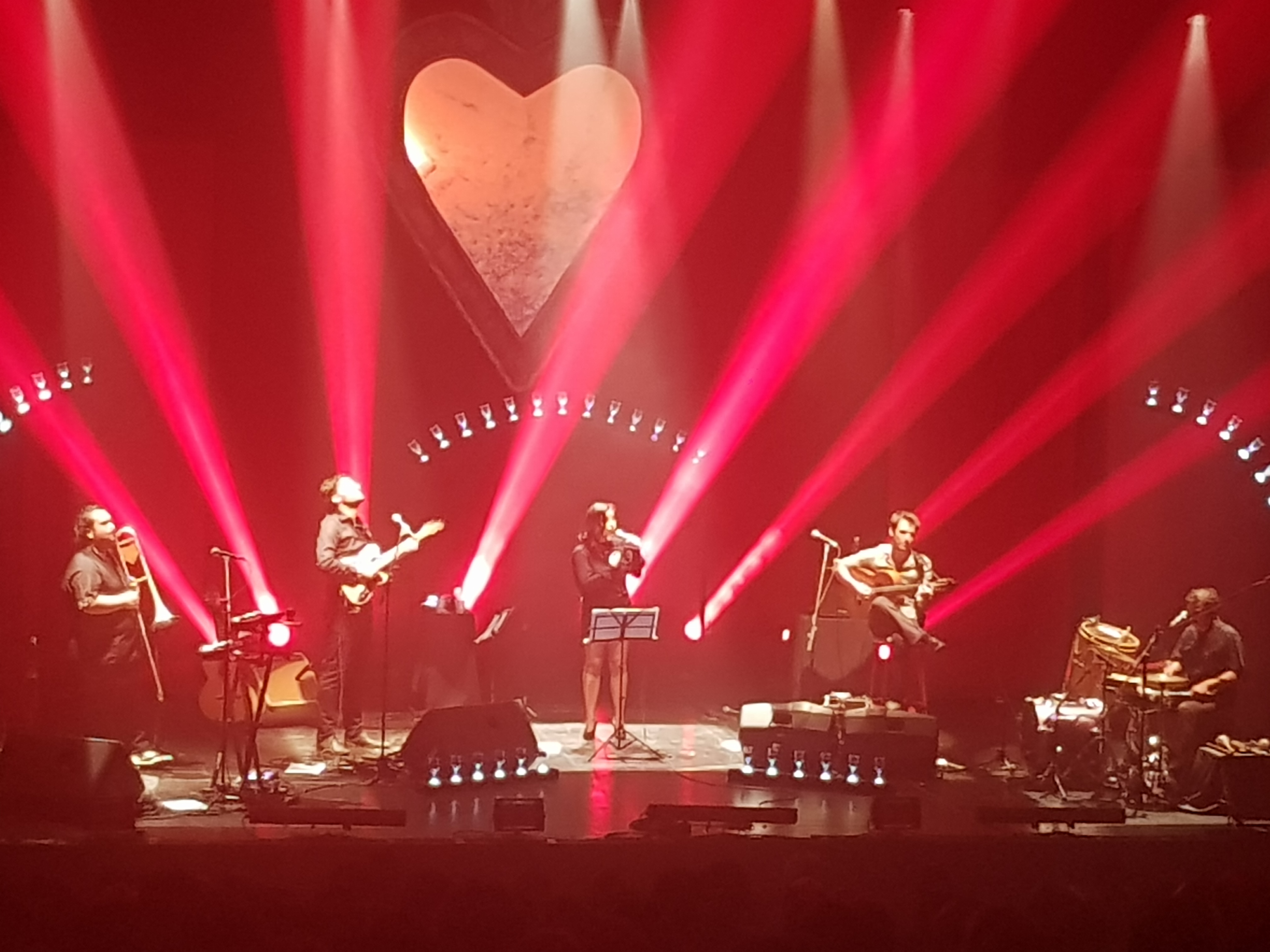 Show de Roja y Negro en el Centro Cultural Matucana 100, Santiago, el 23/03/18